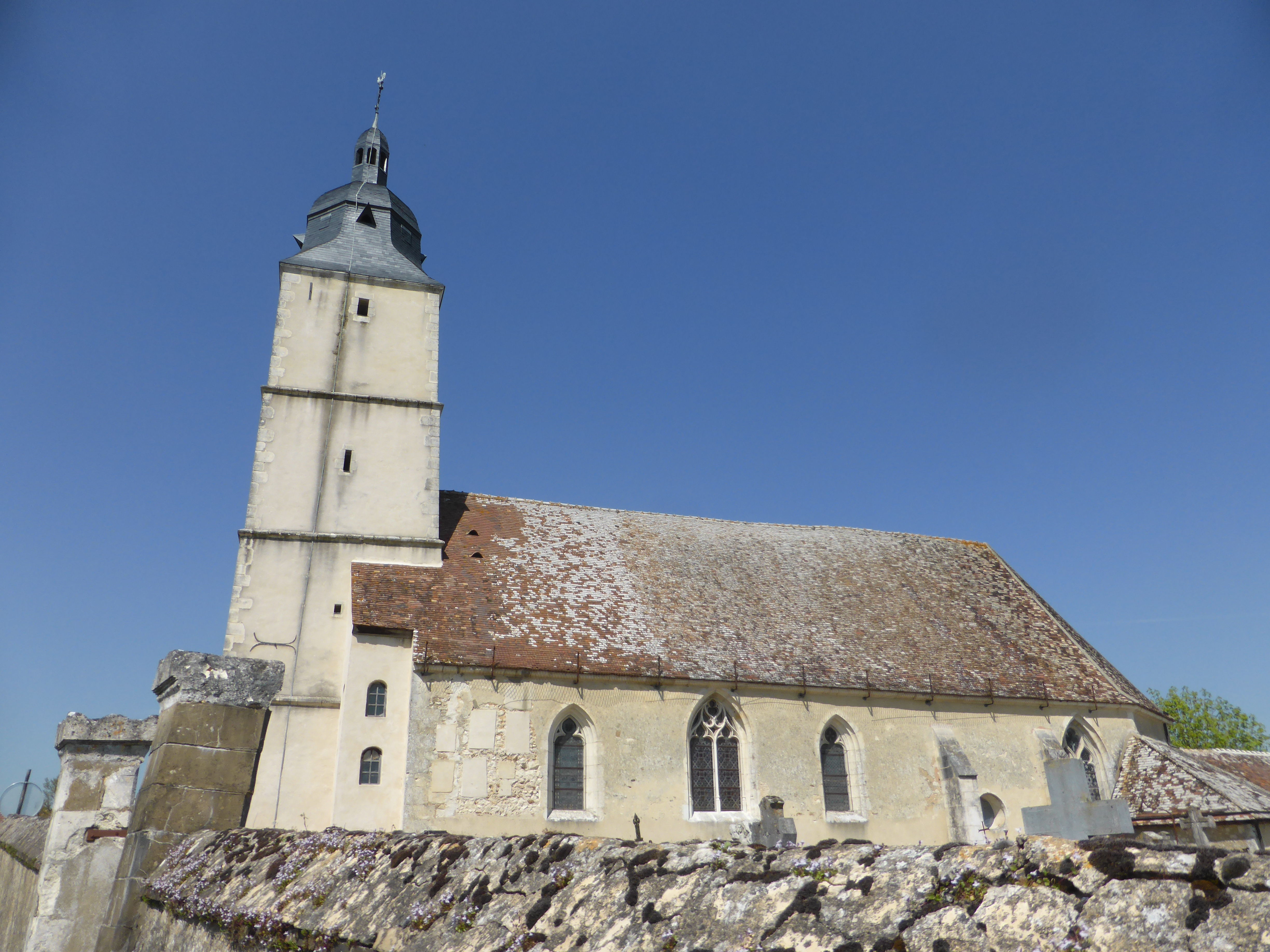 Église Saint-Martin de Brunelles, en Eure-et-Loir.